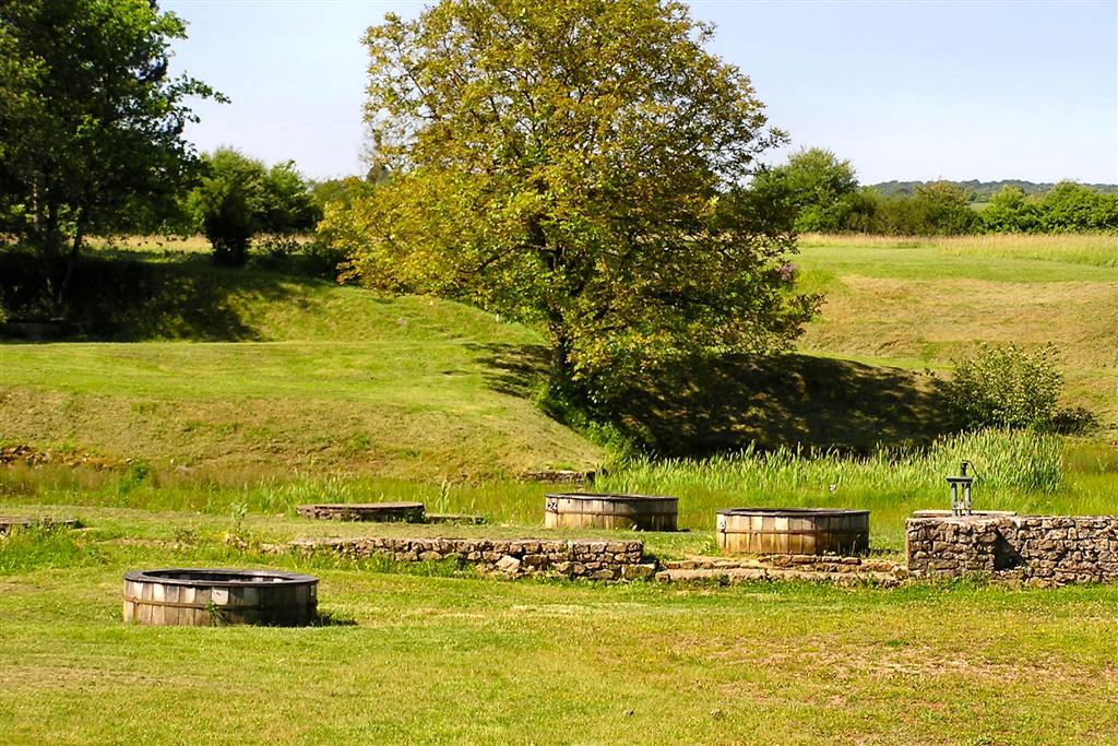 Le site archéologique celtique et gallo-romain des Fontaines salées, à cheval entre Foissy-lès-Vézelay et le sud de la commune de Saint-Père, Yonne, Bourgogne, France. Bassins de captage de l'eau, vue vers le sud-ouest. La rivière Cure coule à 75 m derrière le photographe.